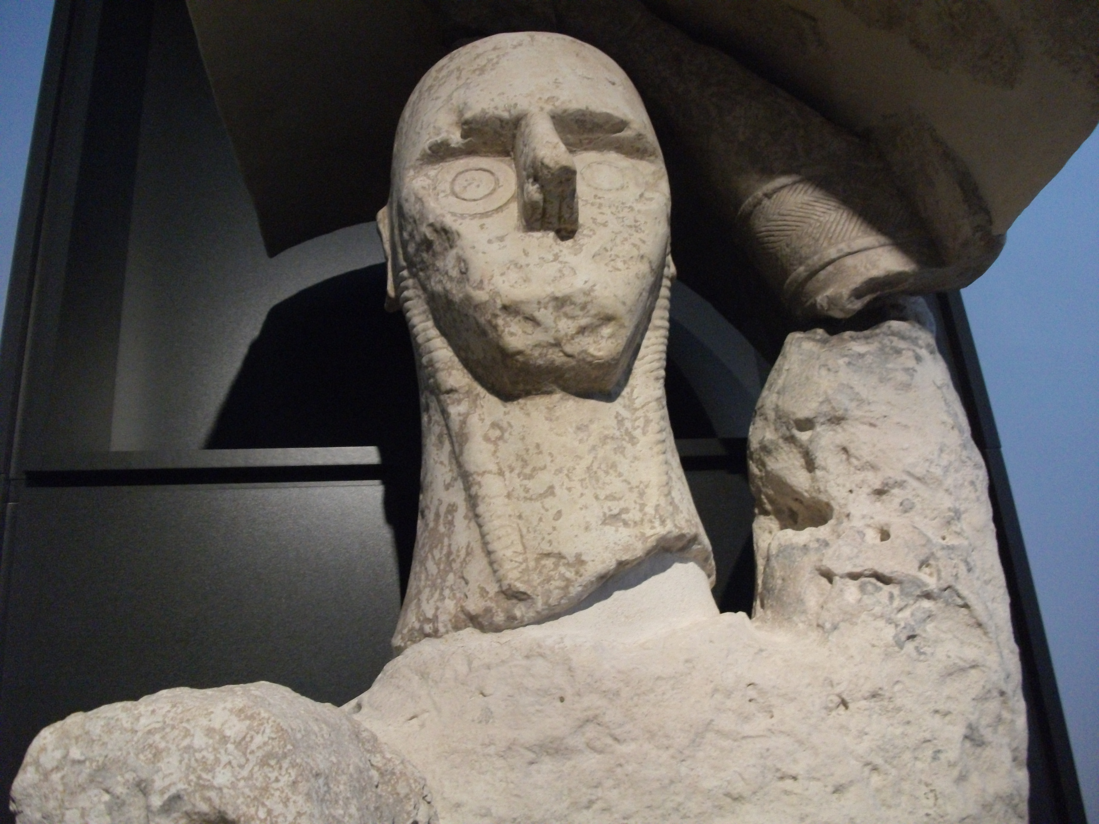 Scultura, Gigante Monte Prama, Pugile, Sinis, Sardegna, Italia civiltà nuragica, preistoria, archeologia, età del bronzo Unknown